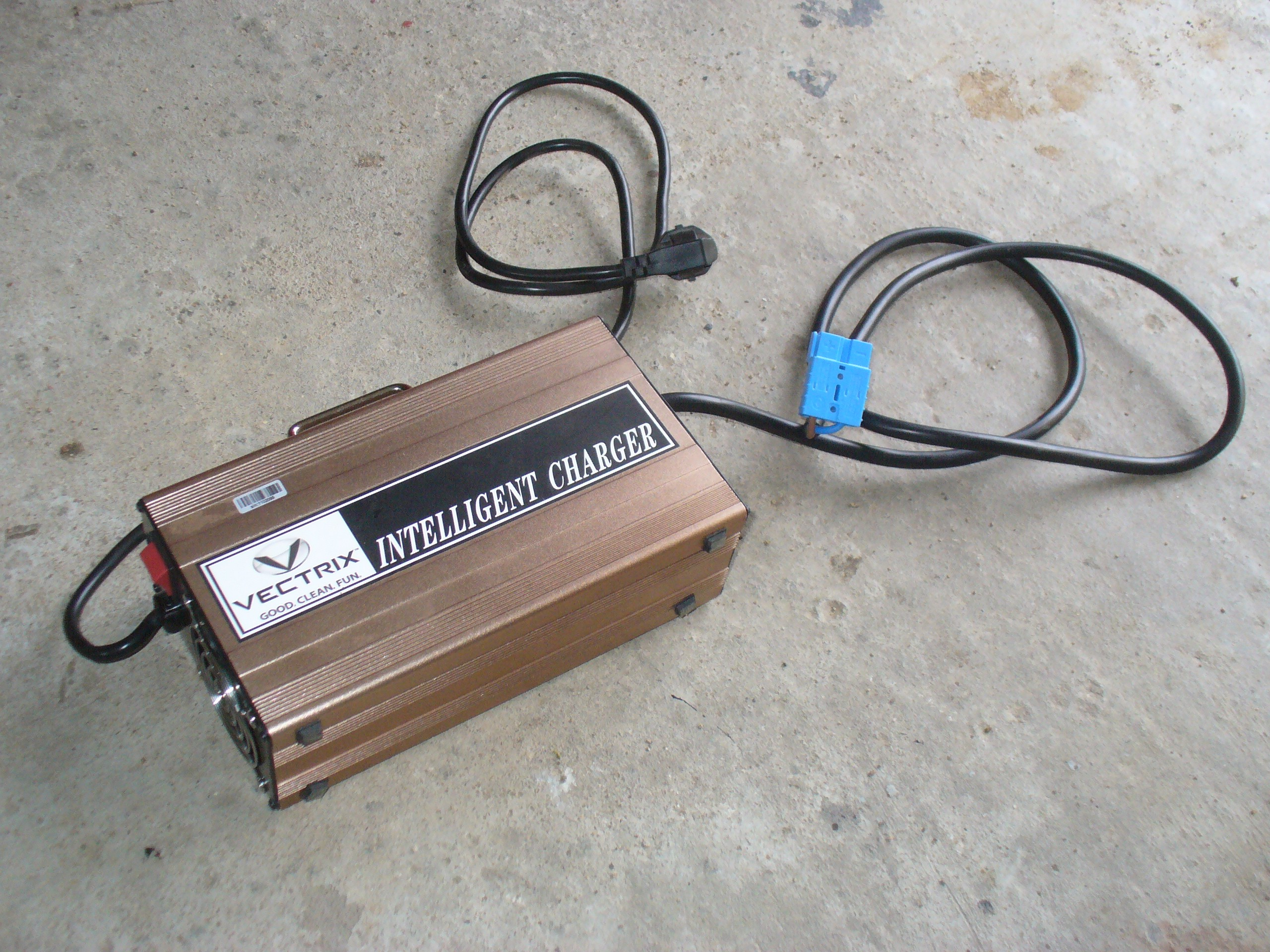 Elektroroller Vectrix VX-2, original mitgeliefertes Ladegerät für die Bleiakkumulatoren 230V AC, 48V DC / 20A